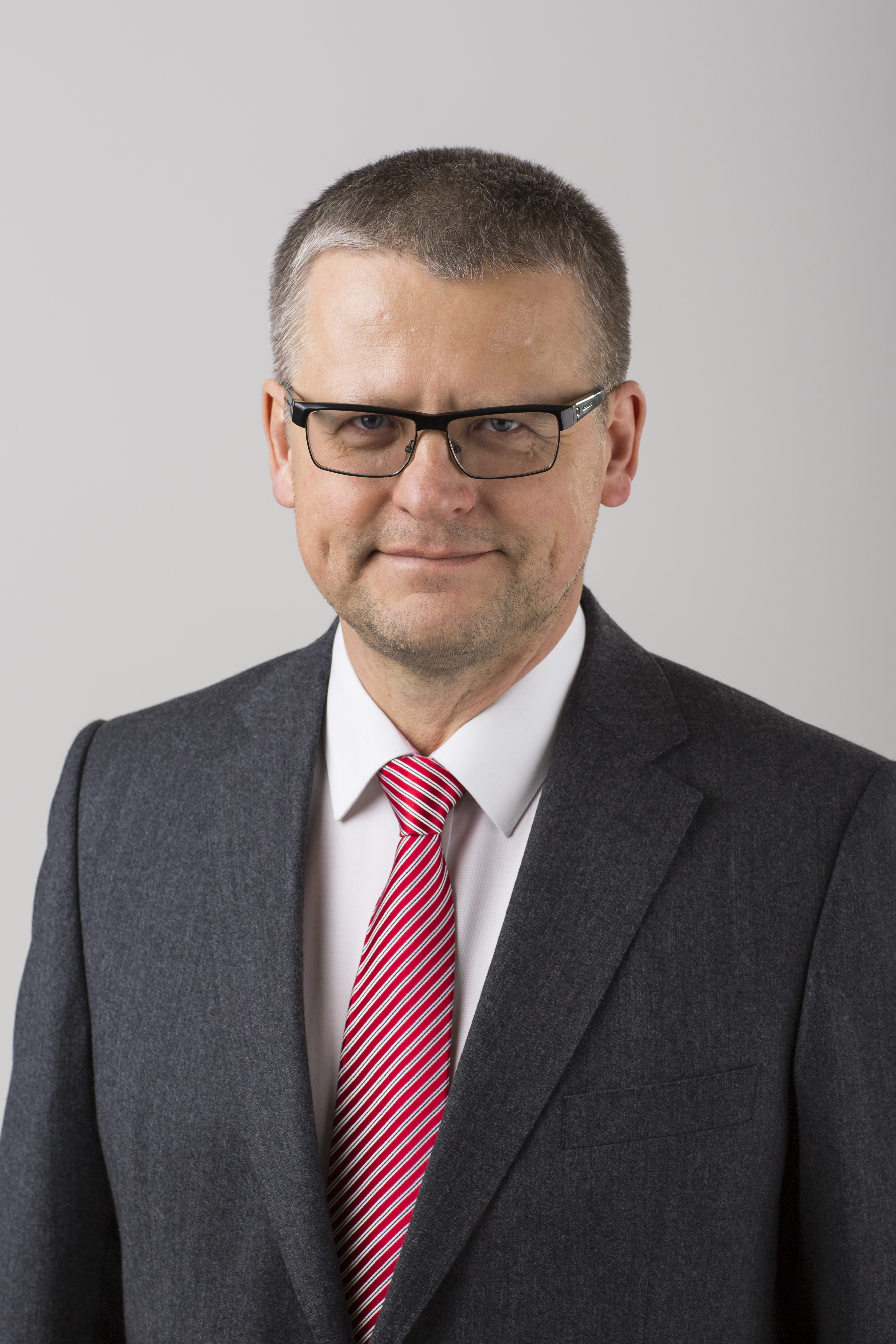 2014.gada 9.decembris. 12.Saeimas deputāts Guntis Belēvičs. Foto: Reinis Inkēns, Saeimas Kanceleja Izmantošanas noteikumi: saeima.lv/lv/autortiesibas